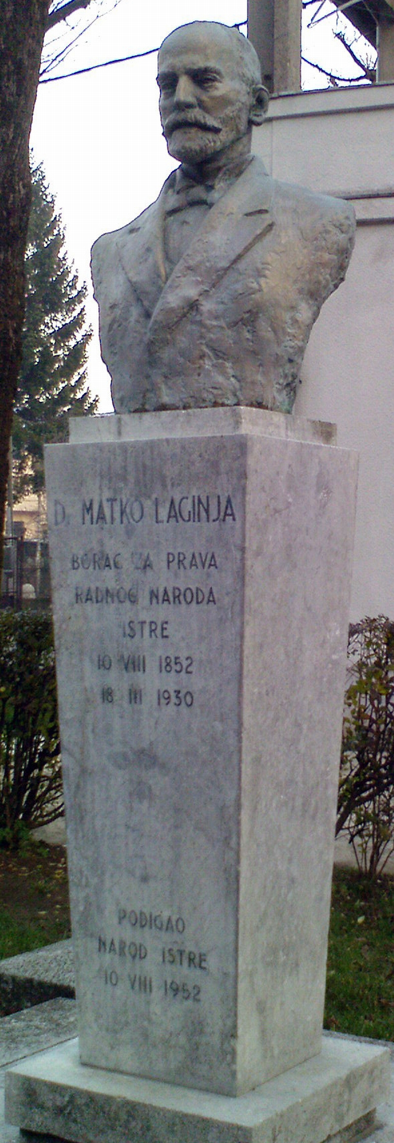 Spomenik Matku Laginji, Klana, Croatia